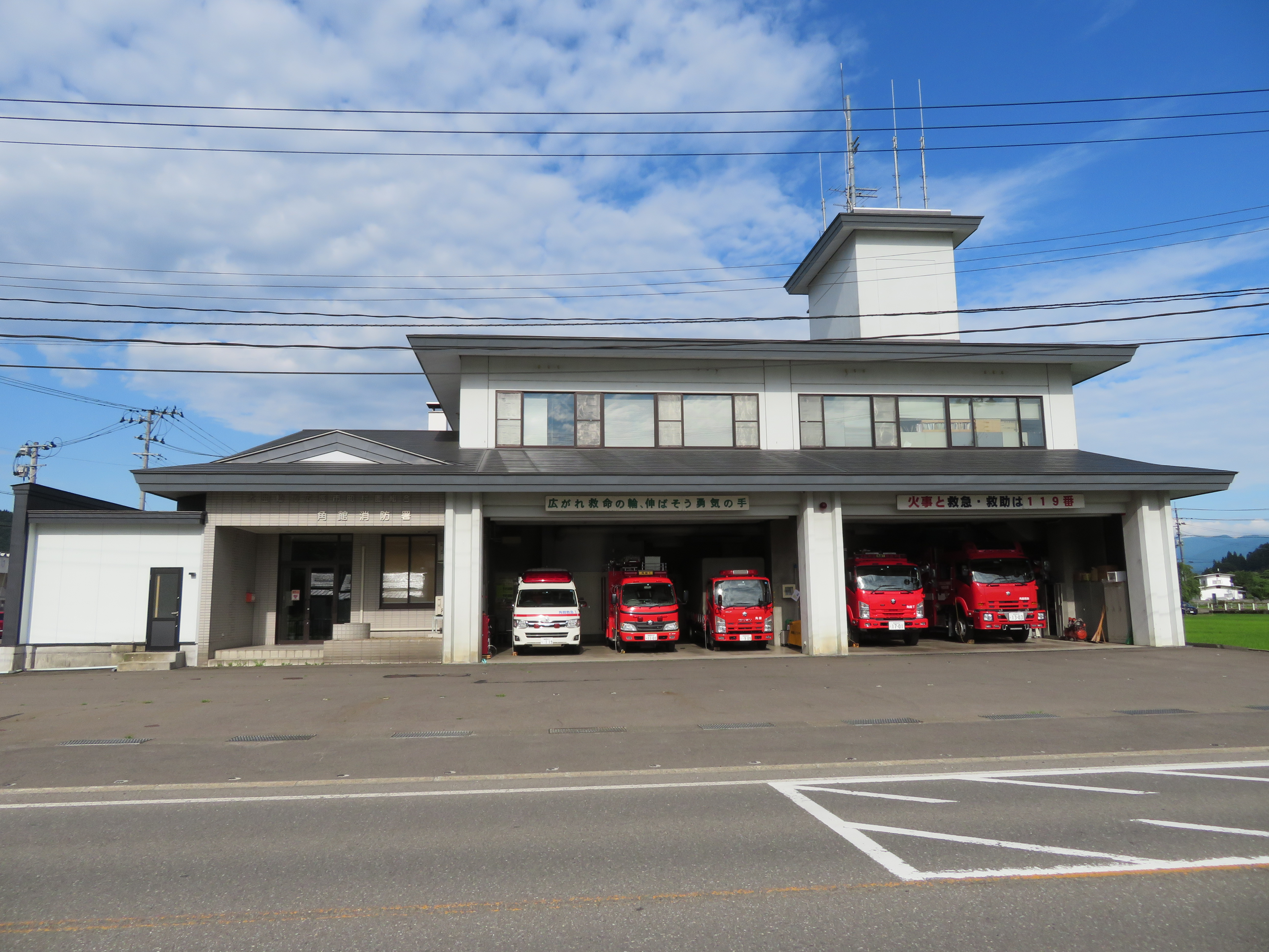 大曲仙北広域市町村圏組合消防本部・角館消防署庁舎